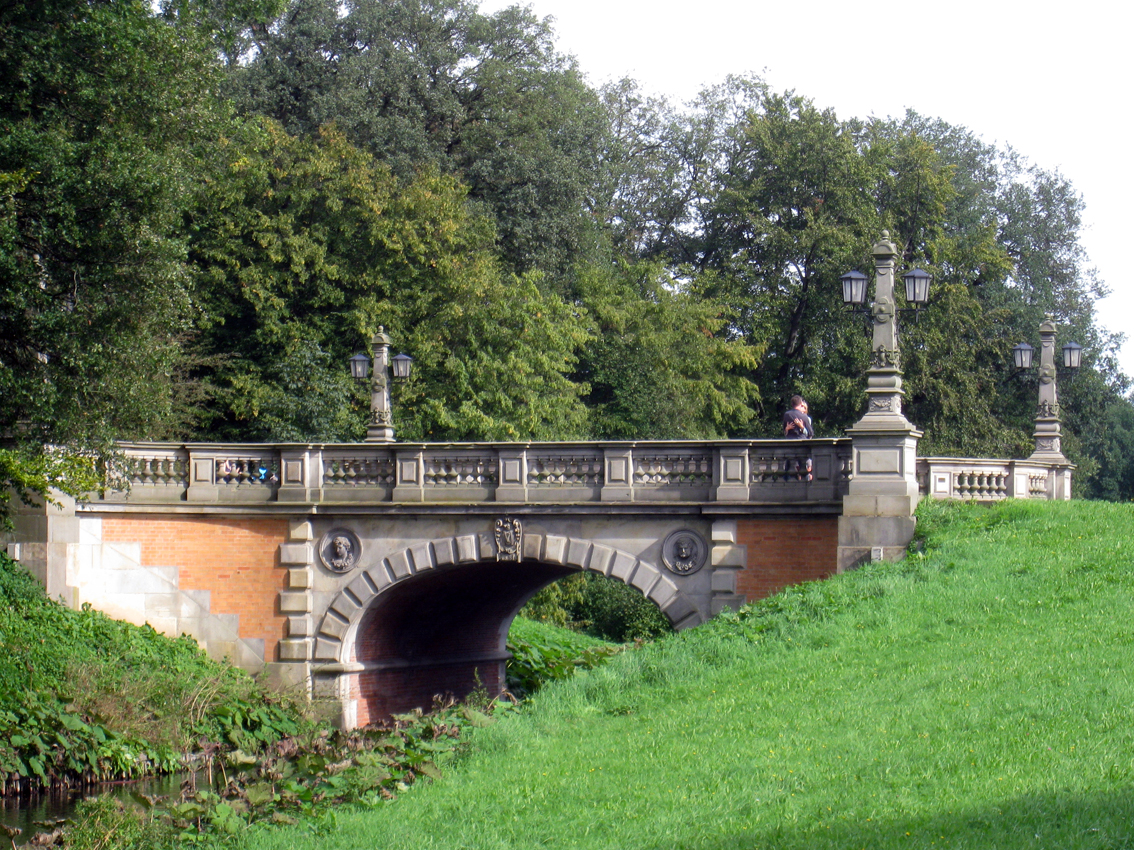 Melchersbrücke in Bremen.Das abgebildete Objekt ist ein geschütztes Kulturdenkmal in der Freien Hansestadt Bremen, mit der Nr. 0218,T018 beim Landesamt für Denkmalpflege registriert.